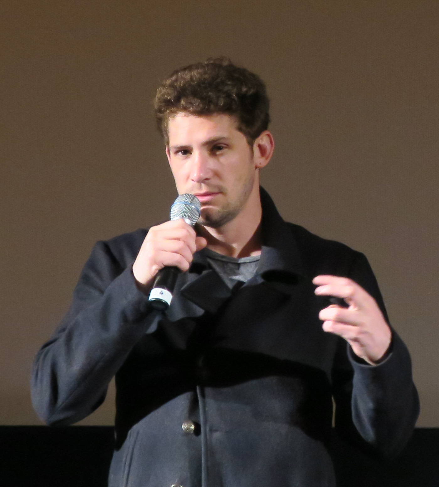 Fernando Guzzoni bei der Deutschlandpremiere seines Films "Jesus auf dem Hamburger Filmfest 2016